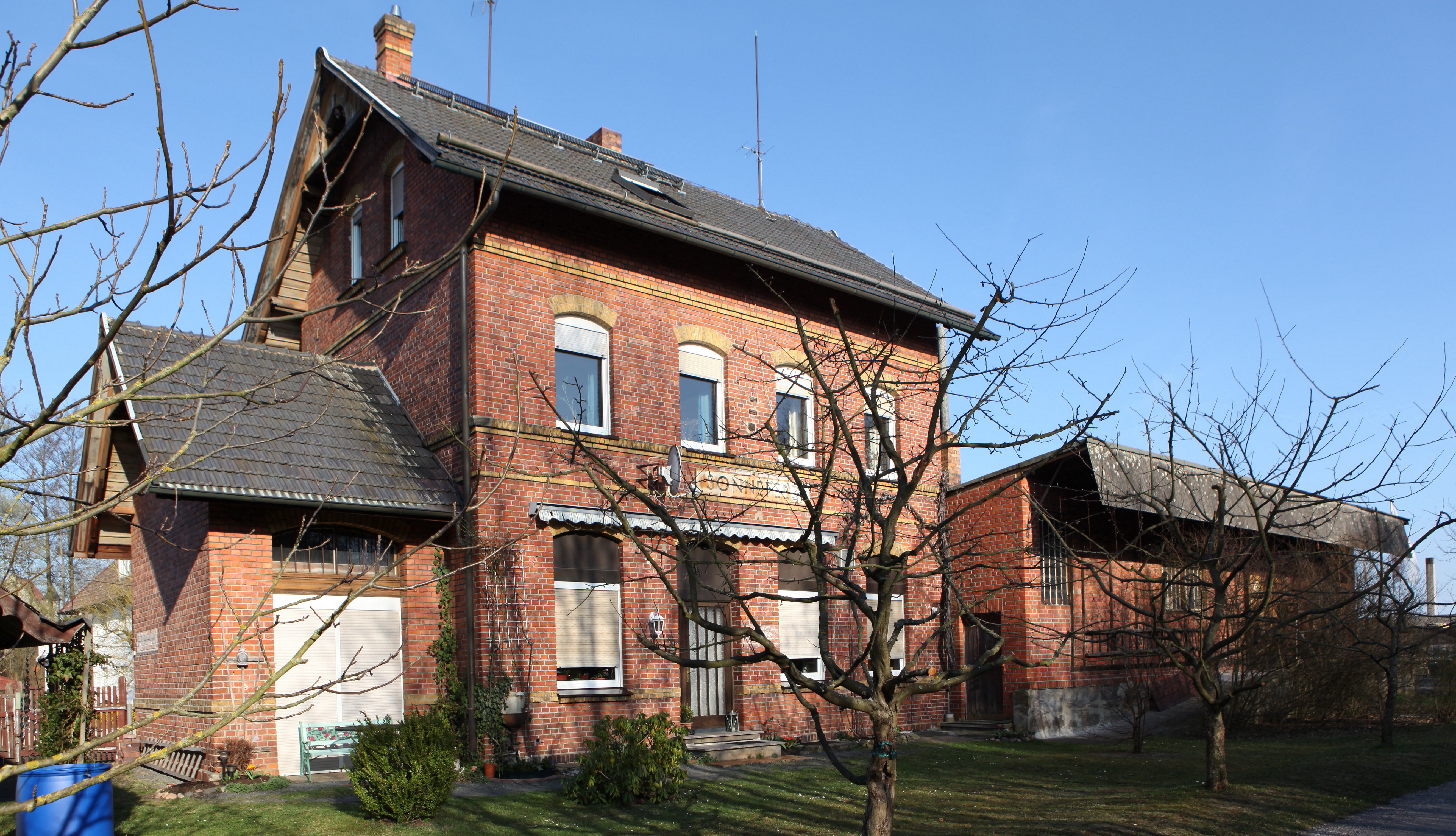 Ehemaliges Empfangsgebäude des Sonnefelder Bahnhofs